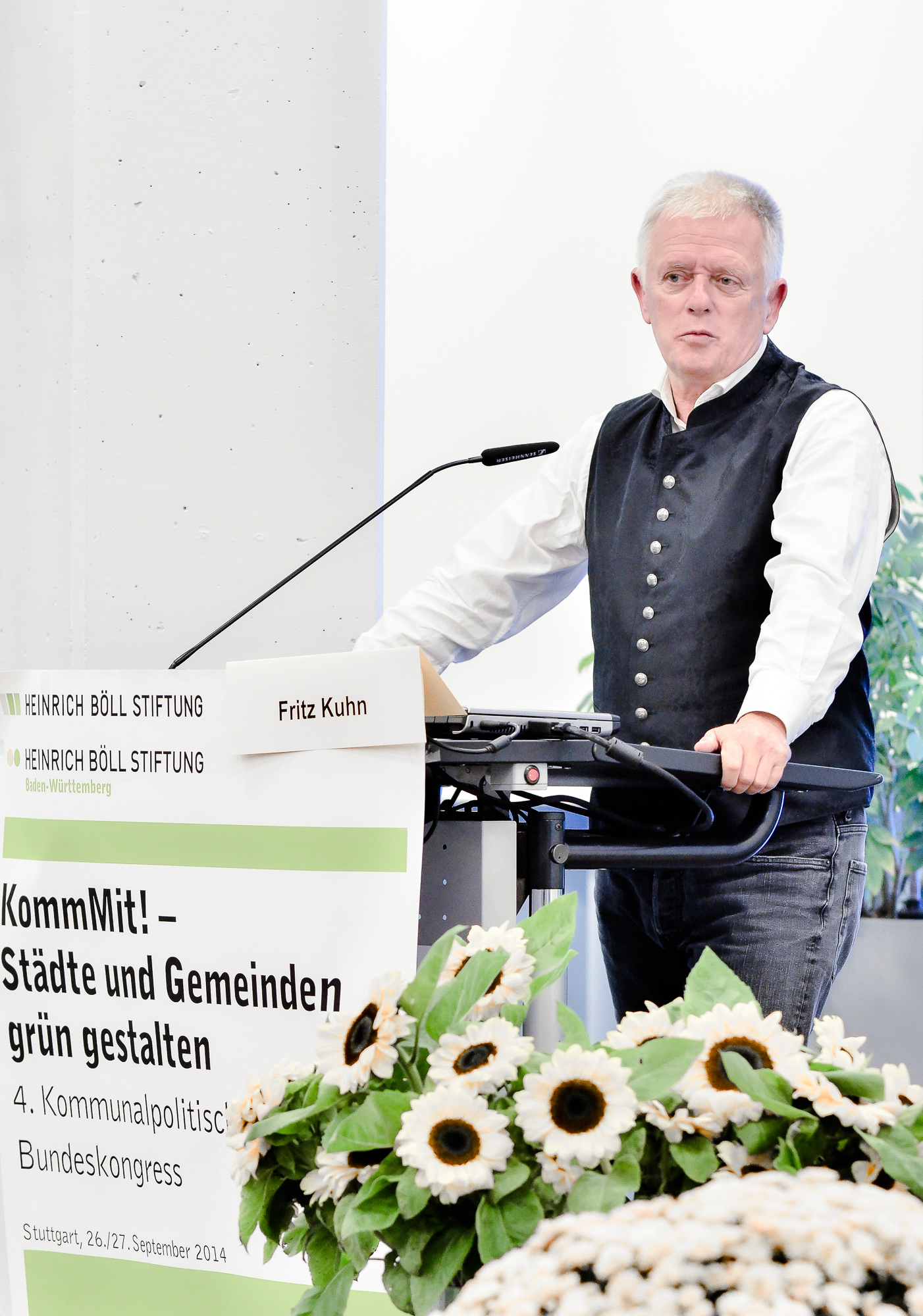 Fritz Kuhn, Oberbürgermeister Stuttgarts, 2014